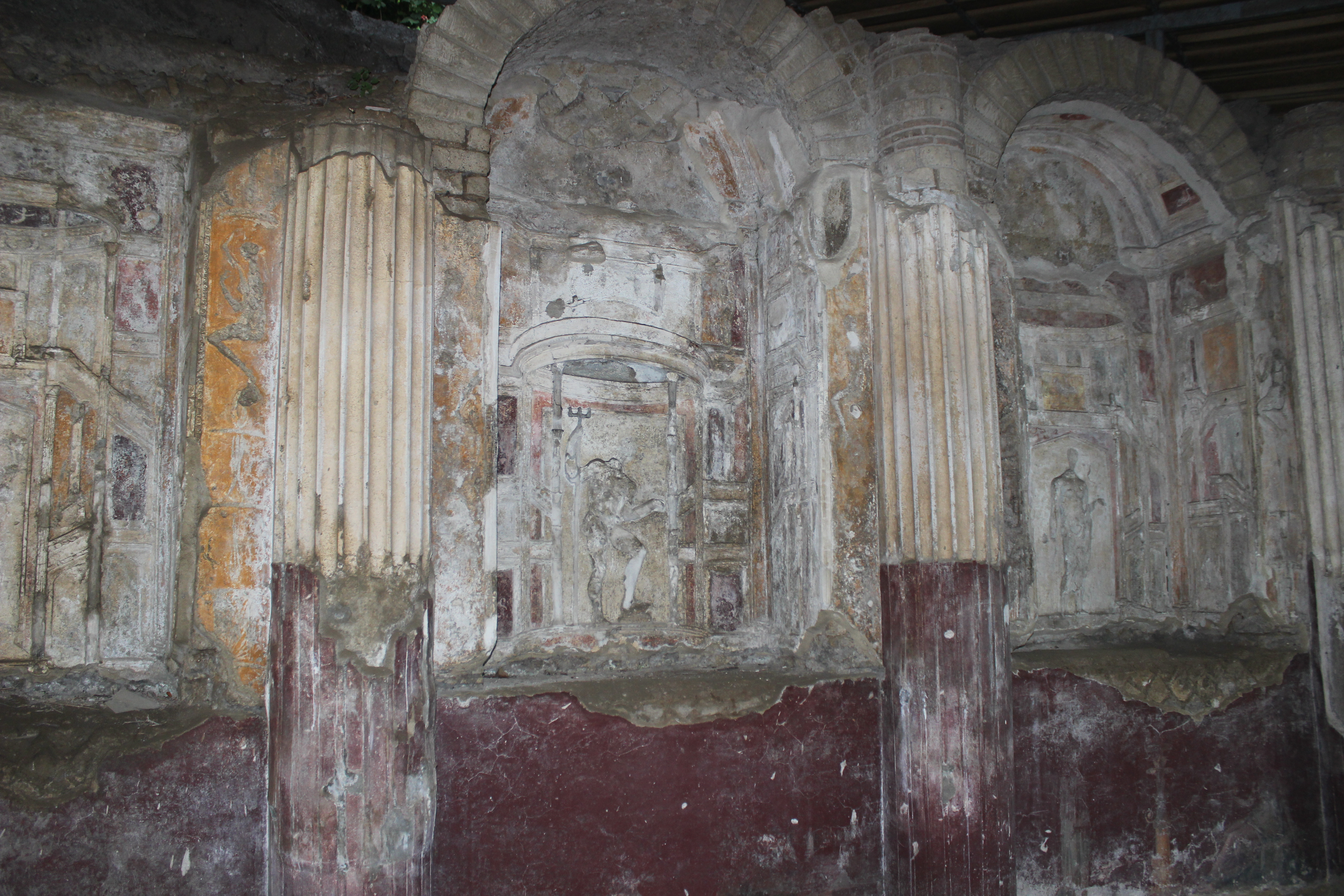 Ninfeo di Villa San Marco